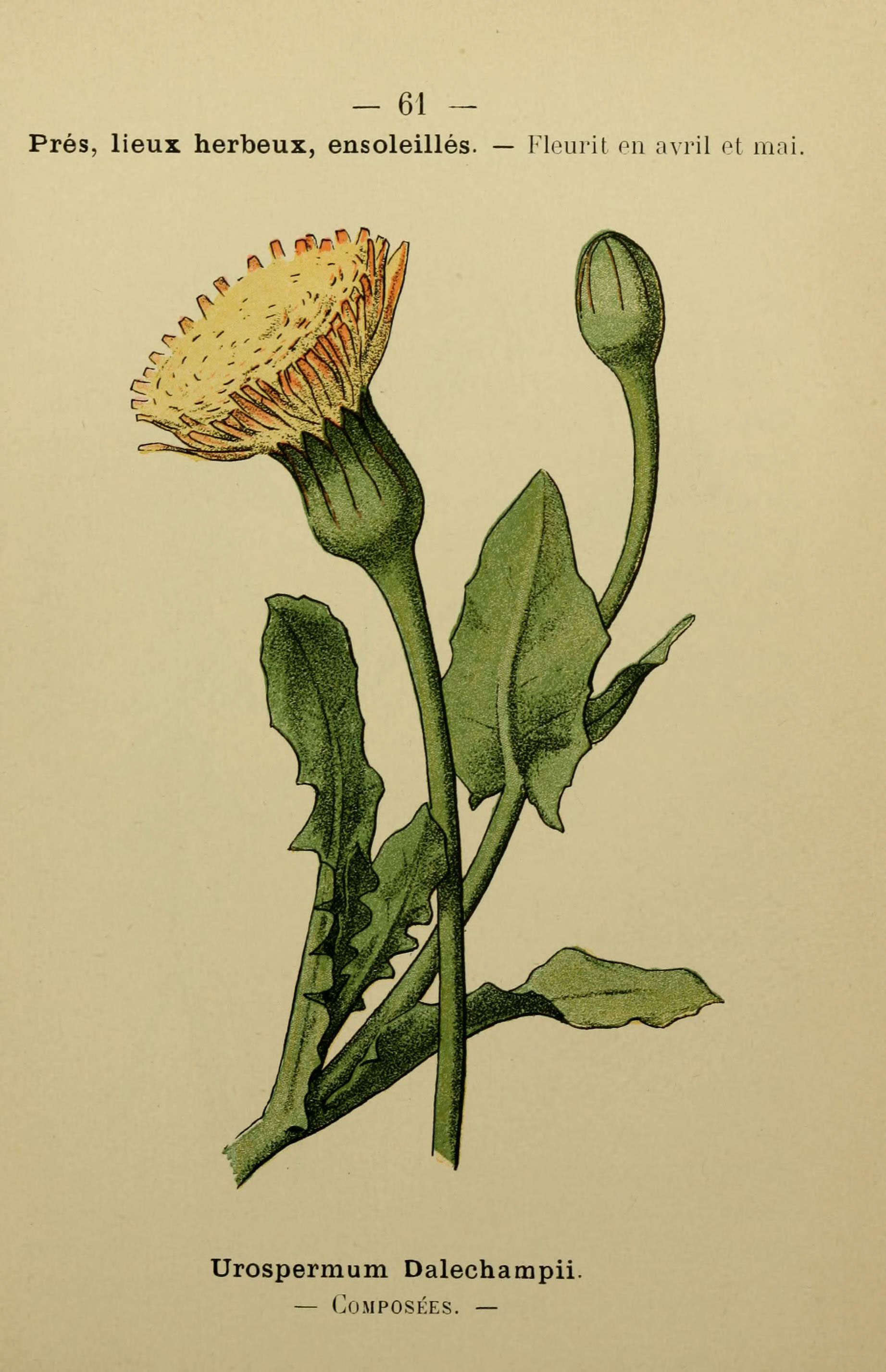 61 - Prés, lieux herbeux, ensoleillés. — Fleurit on avril et mai. rpr.'^Cr Urospermum Dalechampii. — (JOMPOSKES. —